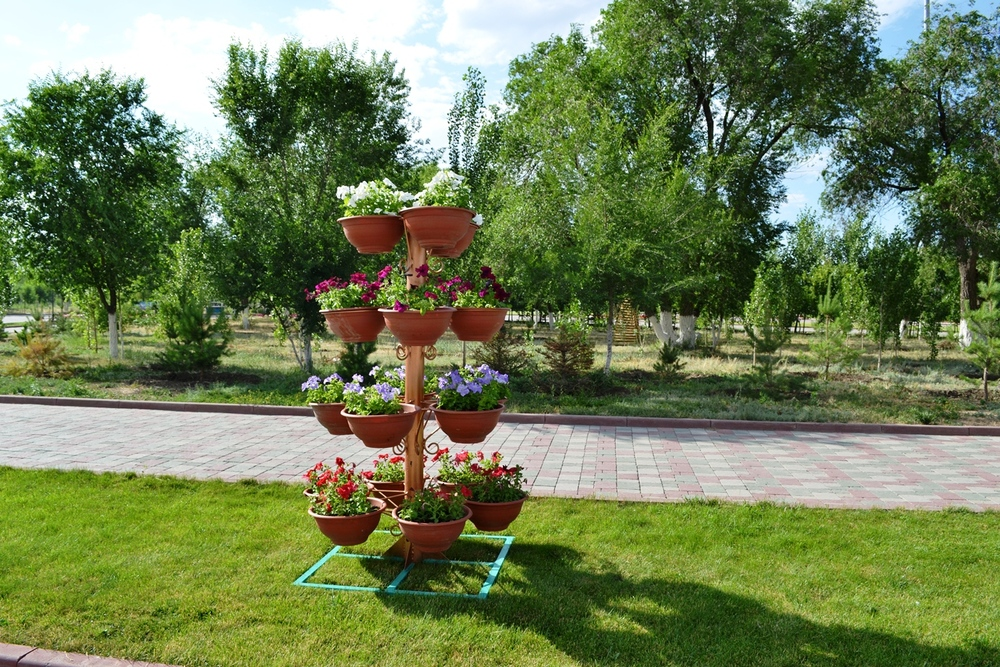 Зелёные насаждения в Актобе